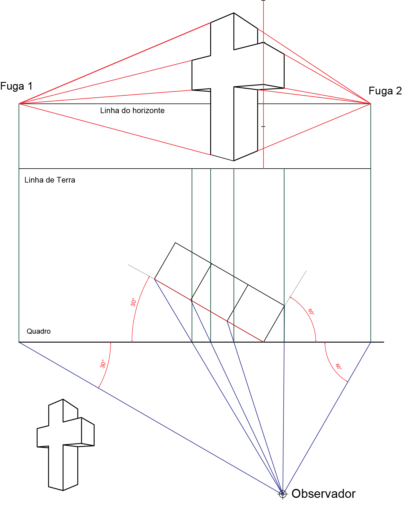 Perspectiva do arquiteto - Desenho baseado em livro de Descritiva e Projetiva.